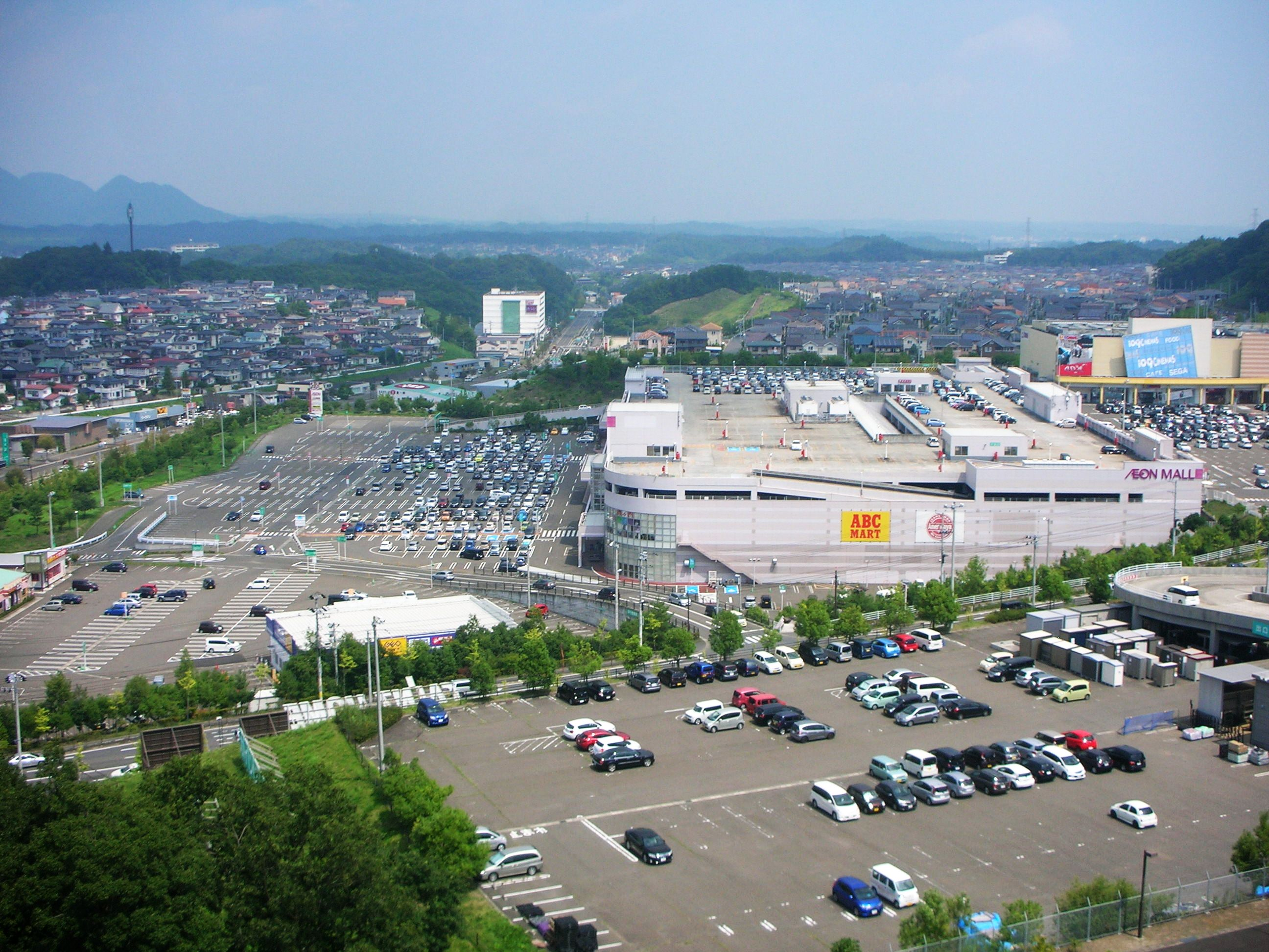 イオンモール富谷